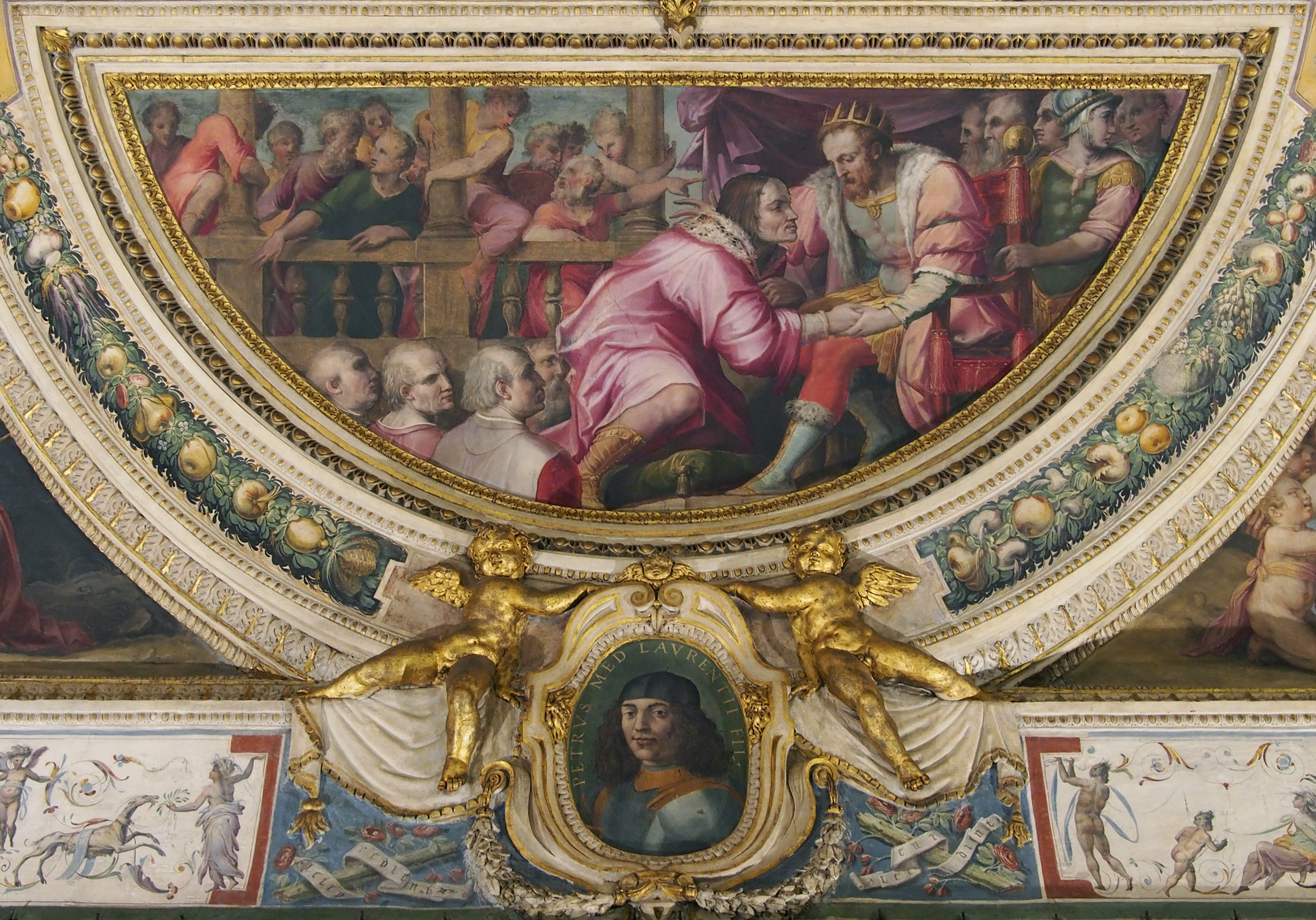 Lorenzo il Magnifico si reca a Napoli dal re Ferdinando d'AragonLorenzo di Magnifico visits king Ferdinand of Aragon in Naplestitle QS:P1476,it:"Lorenzo il Magnifico si reca a Napoli dal re Ferdinando d'Aragon" label QS:Lit,"Lorenzo il Magnifico si reca a Napoli dal re Ferdinando d'Aragon" label QS:Len,"Lorenzo di Magnifico visits king Ferdinand of Aragon in Naples"